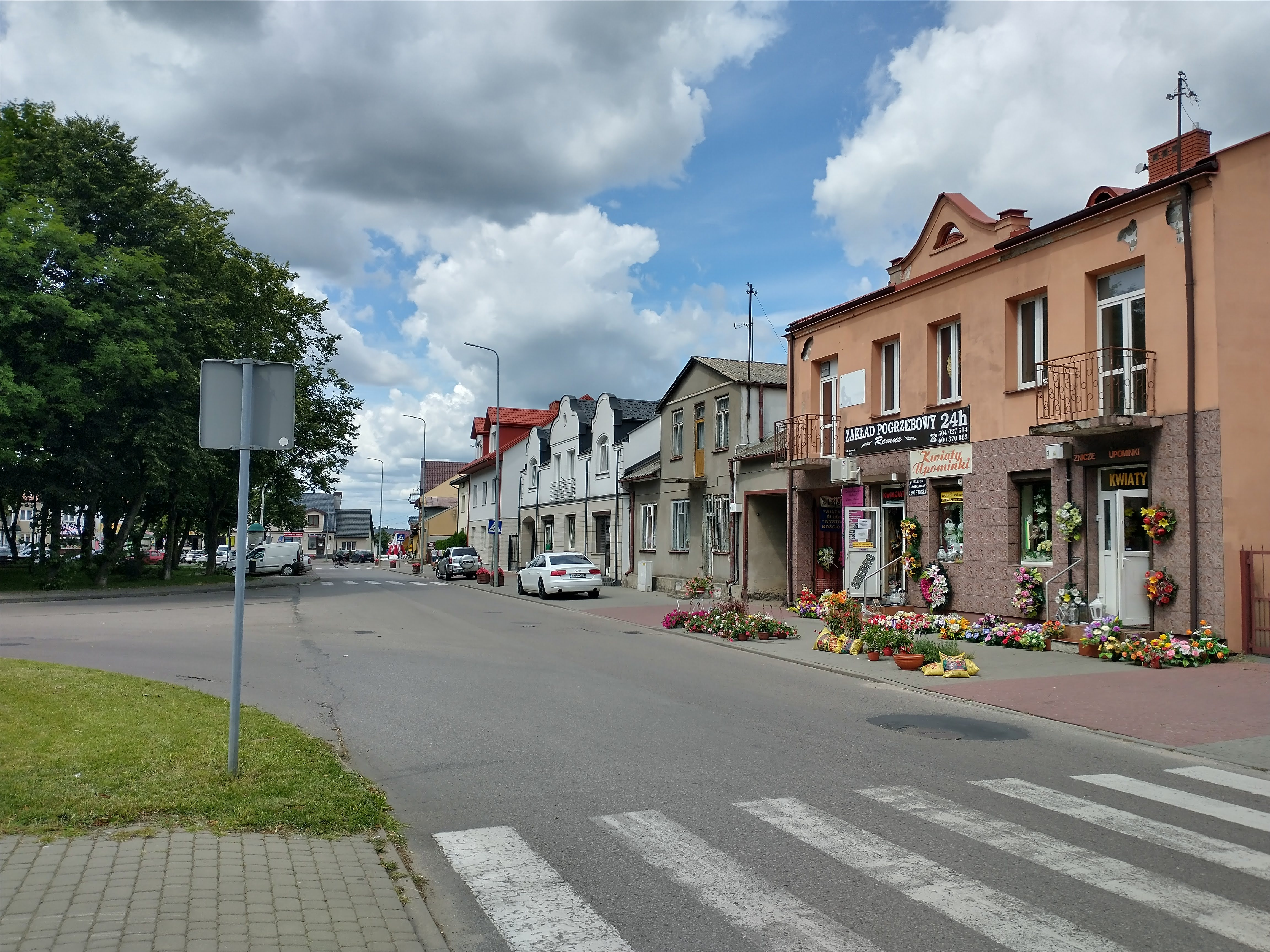 Dobre - powiat miński.